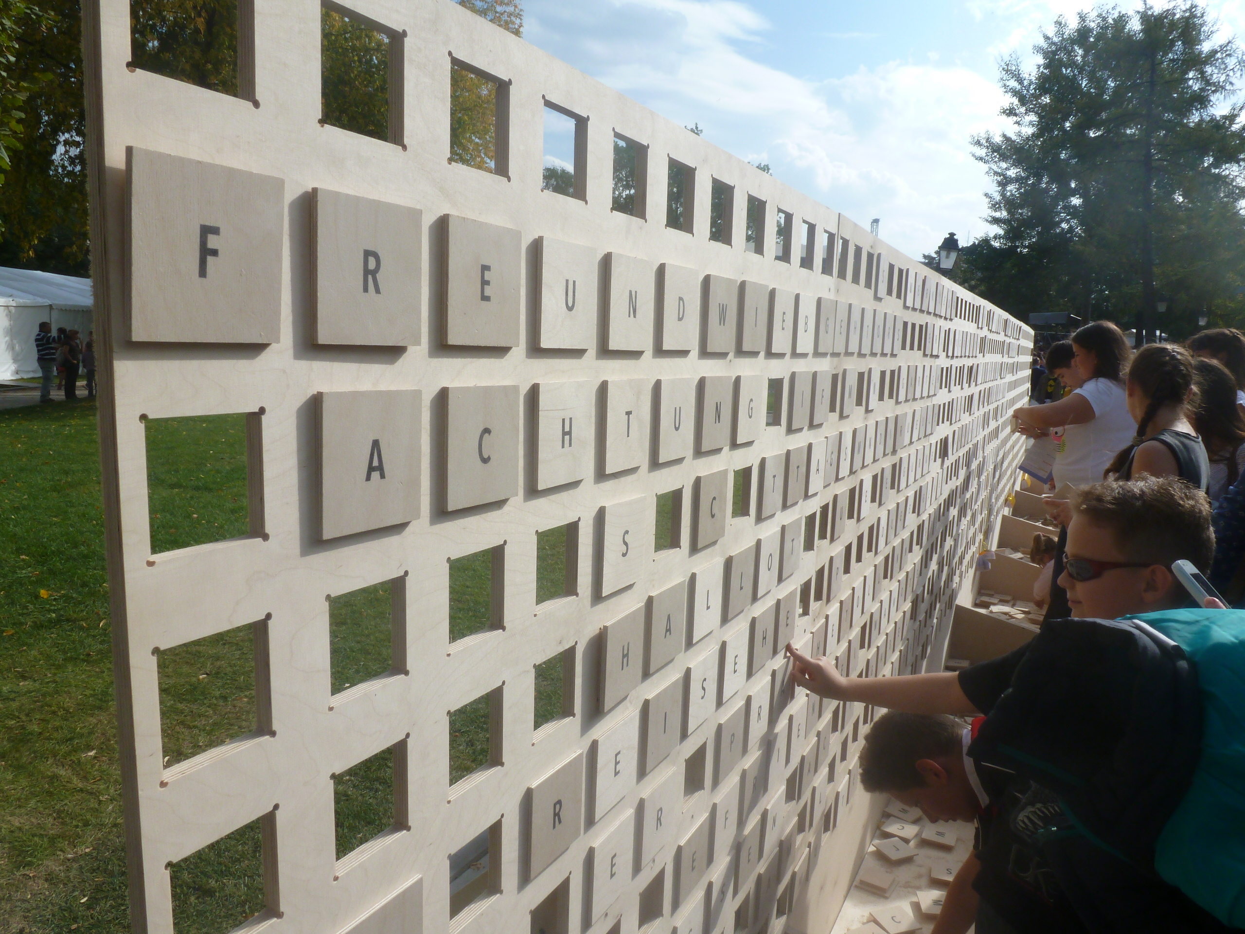 Festivalo de germana lingvo en Moskvo, Rusio, en jaro 2014.